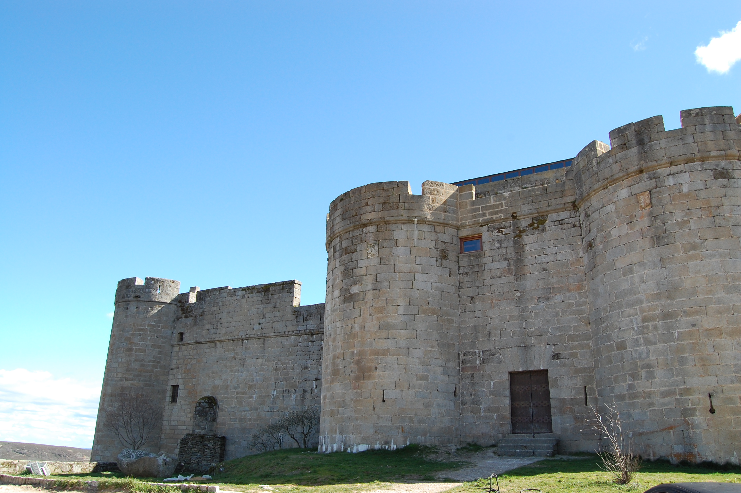 Puebla de Sanabria (Póvoa de Seabra), província de Zamora, Espanha.